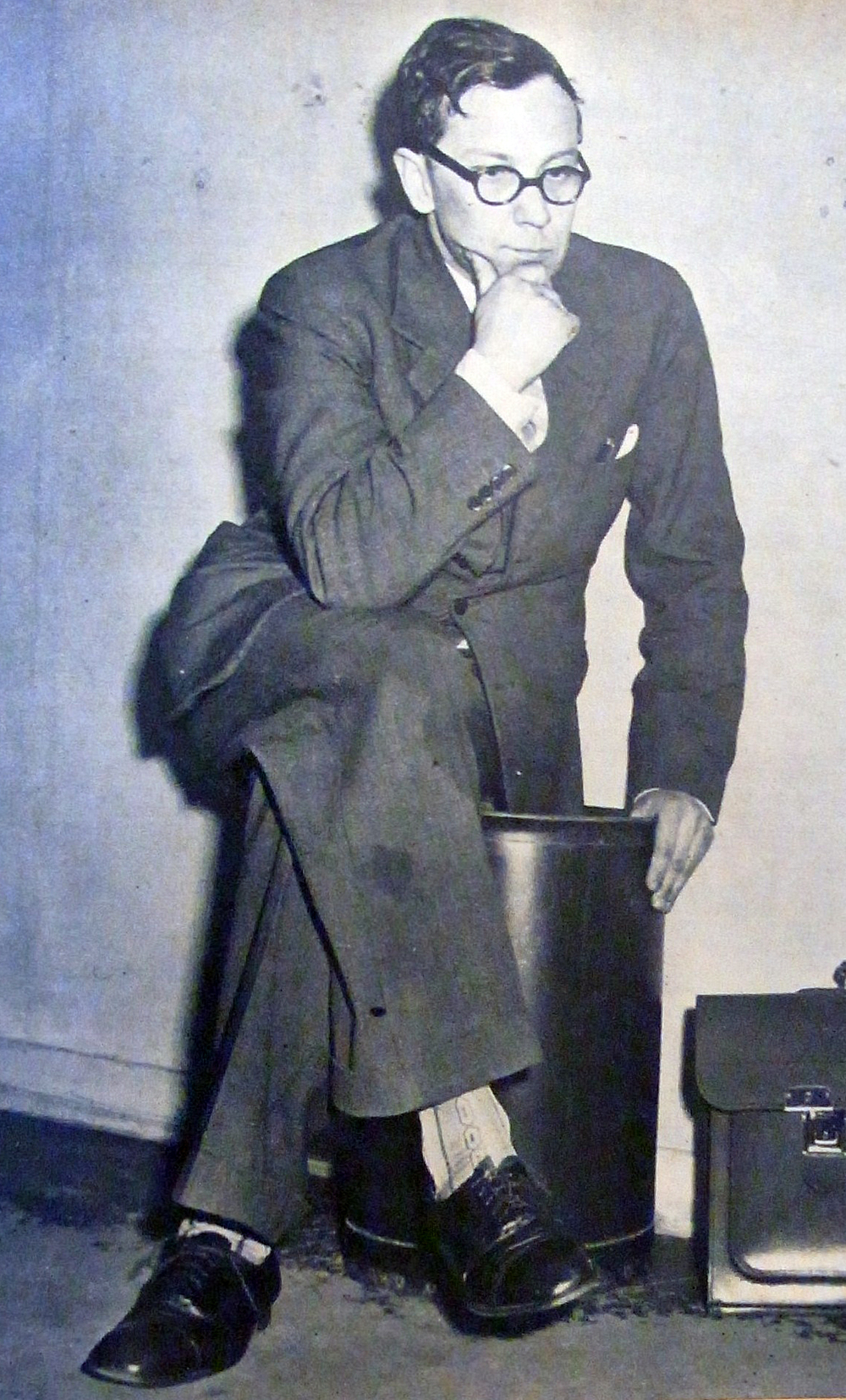 Swedish pastor Karl-Erik Kejne (1913-1960)